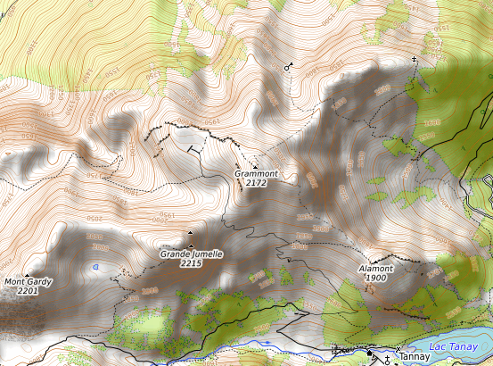 carte réalisée sur umap This map may be incomplete, and may contain errors. Don't rely solely on it for navigation.